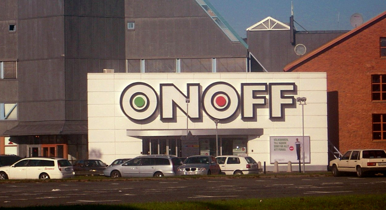 OnOff på A6 i Jönköping